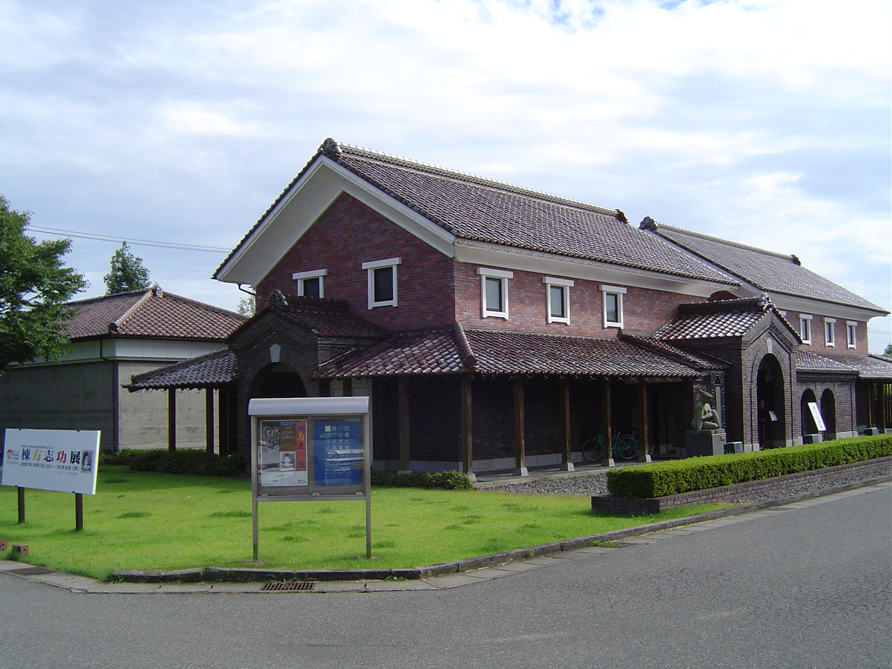 棟方志功展をやっていたのでついでに